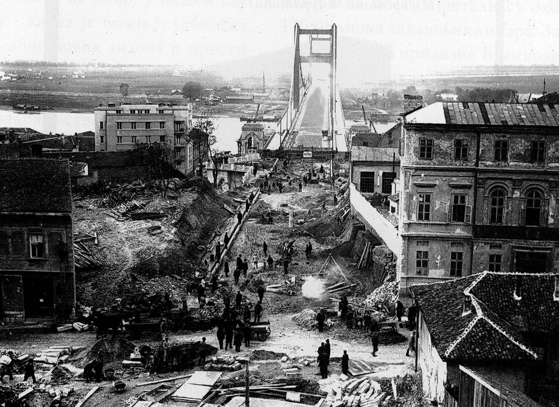 Most kralja Aleksandra, gradnja započeta 1930, otvoren 1934, srušen 1941 u aprilskom bombardovanju